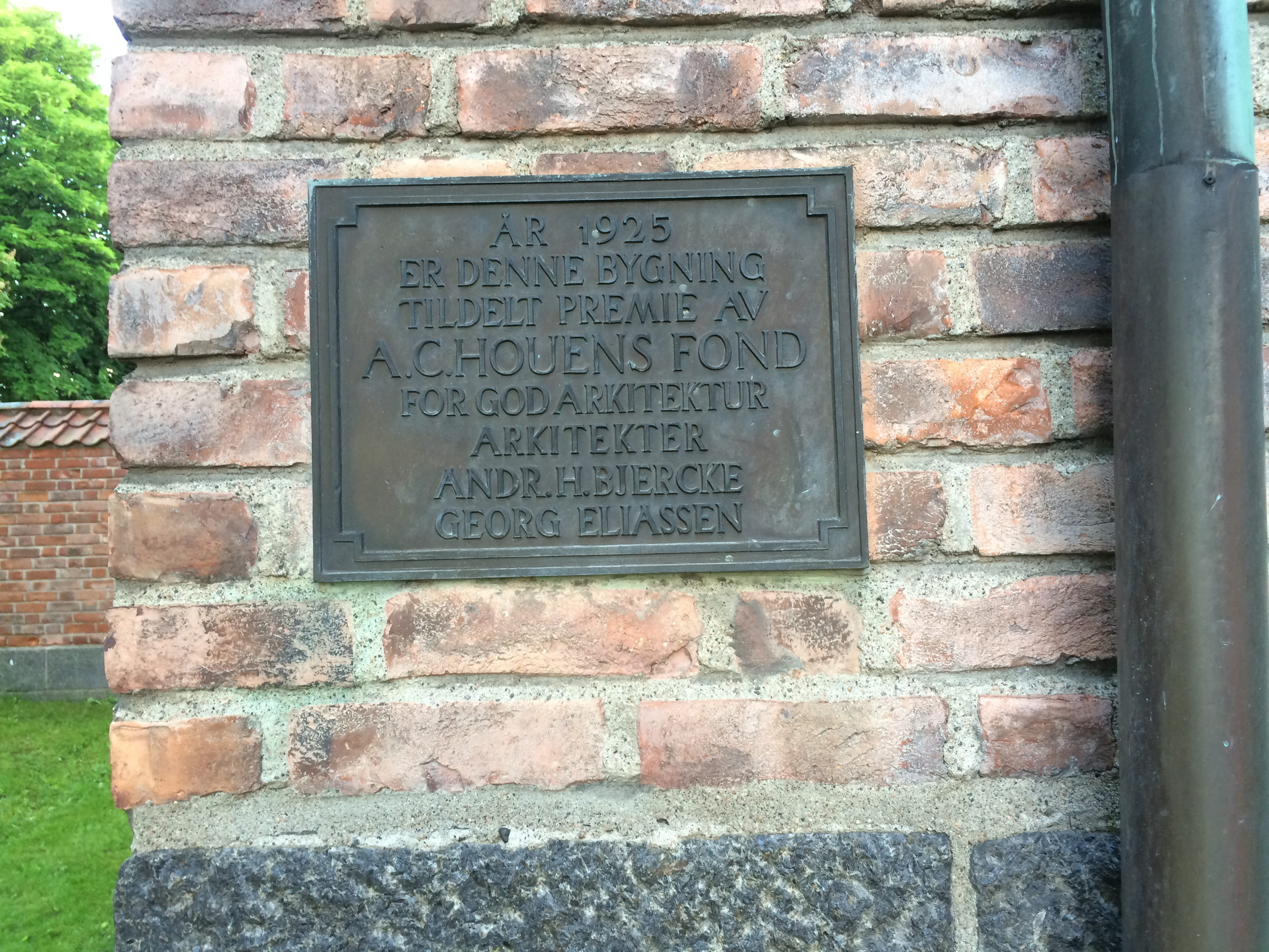 Haugar Vestfold Kunstmuseum i juni 2014. Bygningen ble bygd 1918–1921 som Tønsberg navigasjonsskole (Tønsberg sjømandsskole) på Haugar/Møllebakken i Tønsberg i Vestfold. Arkitekter: Andreas Bjercke og Georg Eliassen. Utsmykning: Tolv karyatider av Wilhelm Rasmussen 1920-1922. Plakett for tildeling av A.C. Houens fond 1925